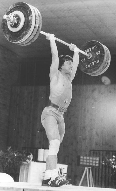 Andreas Letz ADN-ZB Mittelstädt 20.12.1980 Bez. Frankfurt(Oder) : 32.DDR-Gewichthebermeisterschaft-Die 32. DDR-Gewichthebermeisterschaft began am 19.12.1980 in Eberswalde-Finow. Für die beste Leistung des Tages sorgte Andreas Letz (SC Karl-Marx-Stadt) . Der EM-Zweite und Olympiavierte im Bantamgewicht startete dismal eine Gewichtsklasse Höher und steigerte mit 267,5 kg im Zweikampf seinen DDR-Rekord um 7,5 kg. Dreimal steigerte er die Höchstmarke im Federgewicht mit 157,5 kg im Stoßen sowie 267,5 kg bzw. 272,5 kg im Zweikampf.